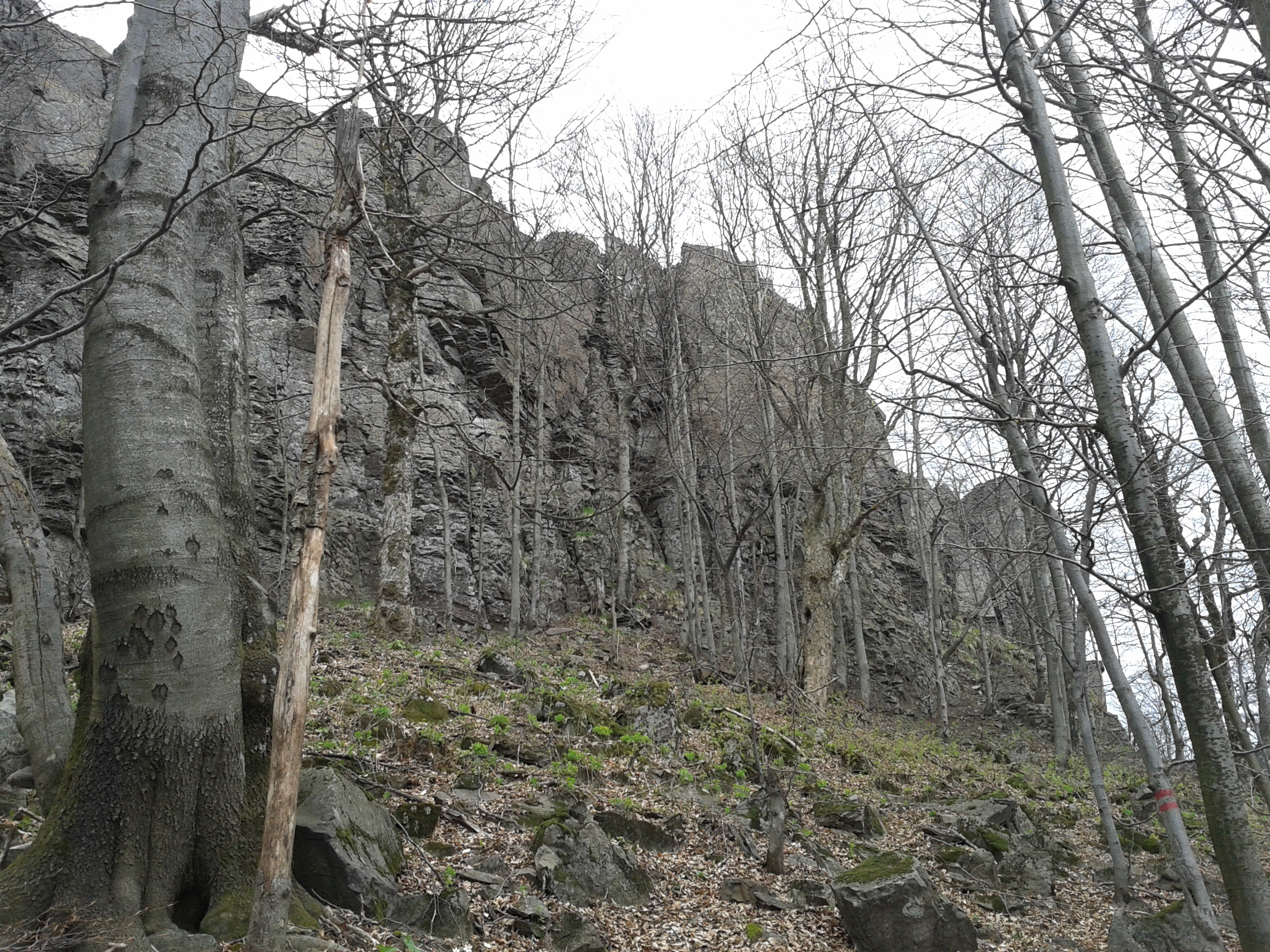 Fotka od úpätia sninského kameňa